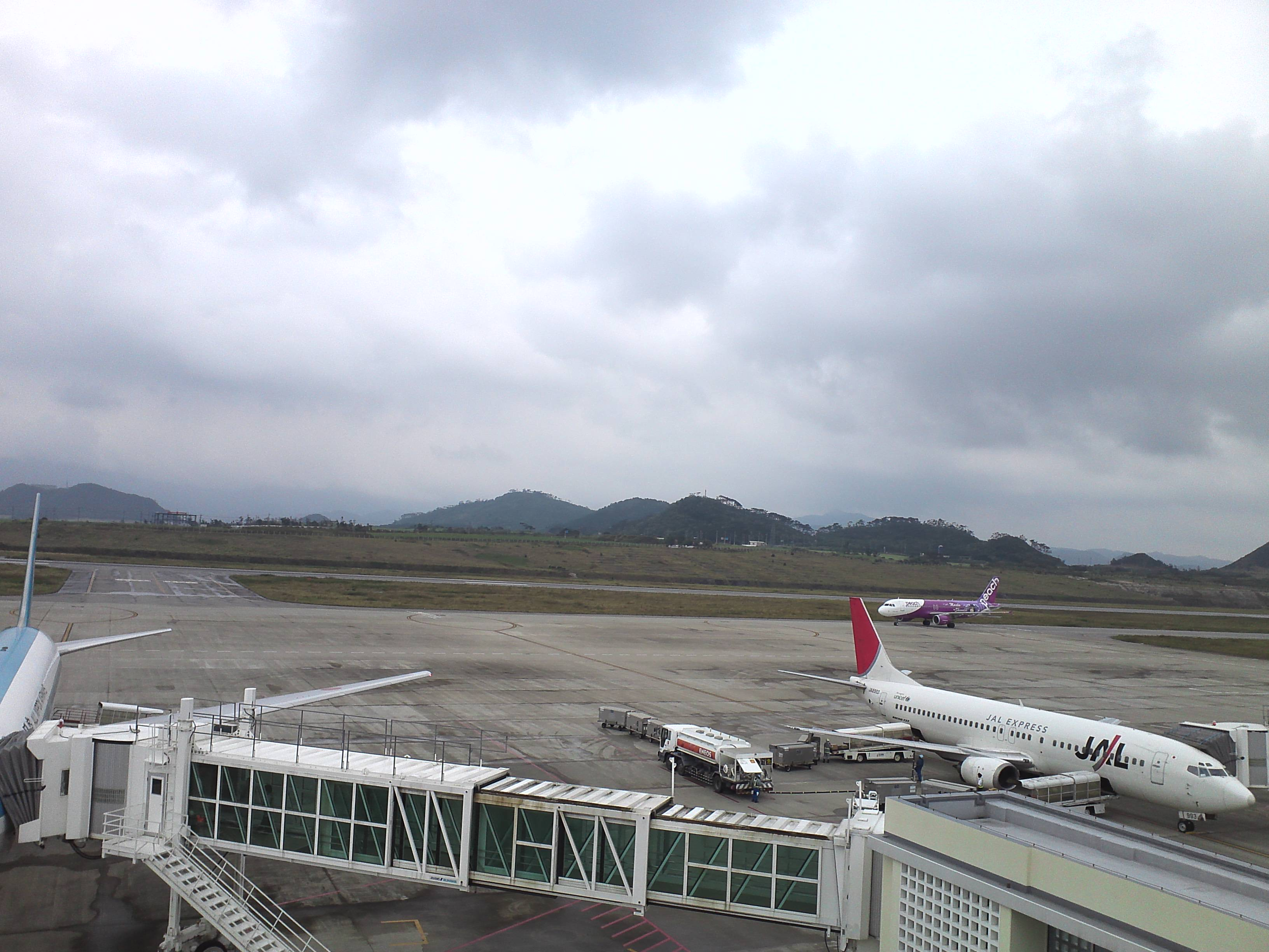 新石垣空港エプロン